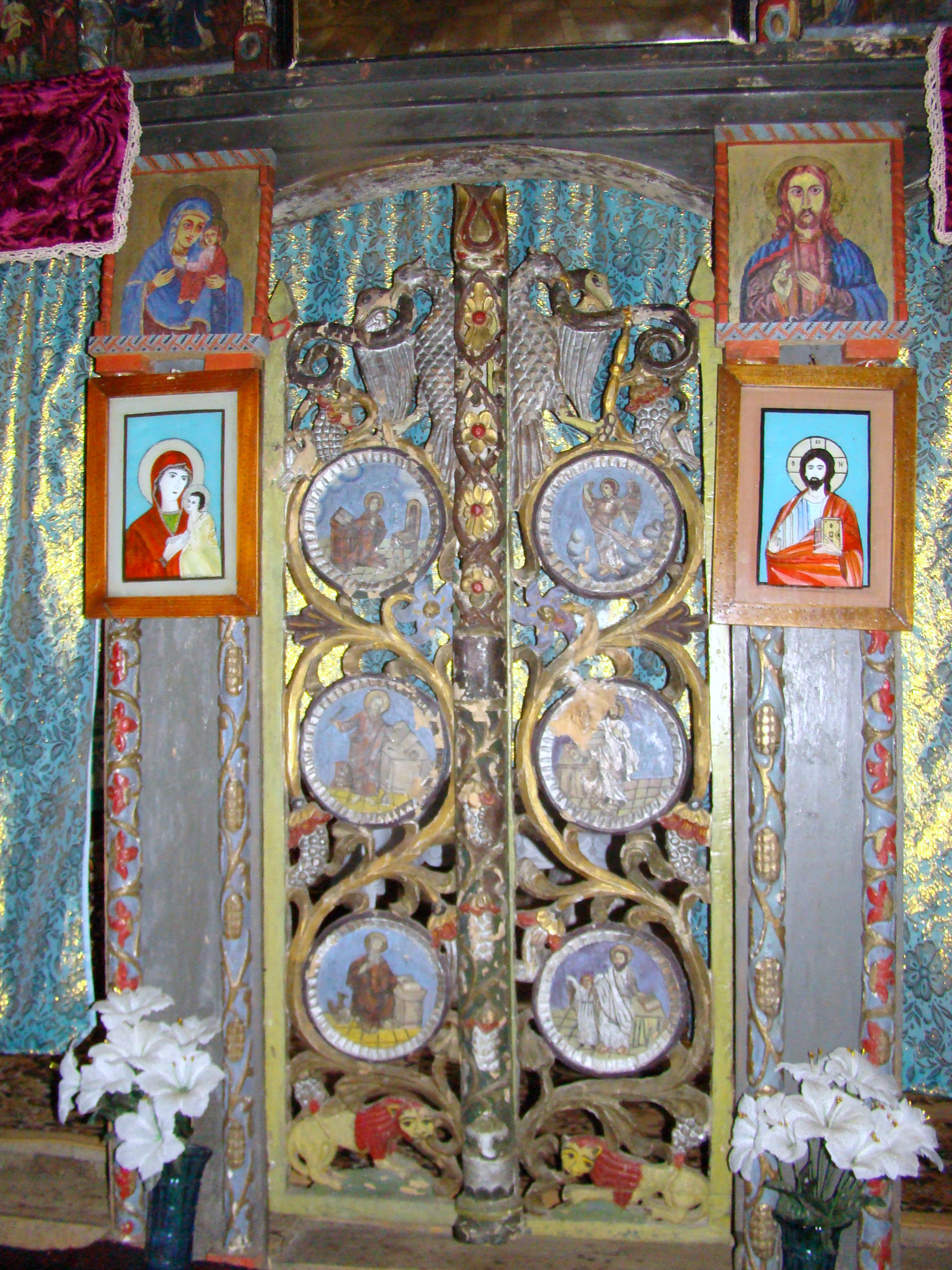 Biserica de lemn „Înălţarea Sfintei Cruci" din Pruneni